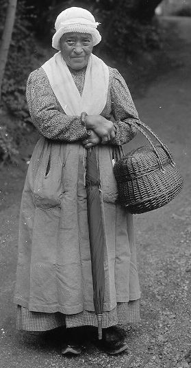 Costume traditionnel français de l'Auvergne en grand format Titre [ En Auvergne, 1900-1925] / Frères Séeberger, photogr. Publication [St Cyr] : [Direction du Patrimoine. Archives du patrimoine photographique], [1900-1925] Description 19 photogr. pos. sur film (internégatifs) : n. et b. ; 13 x 18 cm Licence GPL et GFDL Notes Acq. : Archives photographiques (Médiathèque du Patrimoine) (c) Caisse nationale des Monuments historiques Thème Société, Tourisme Sujet(s) Stations climatiques, thermales, etc. -- France -- Royat (Puy-de-Dôme) Patients d'établissements de soins, de cure, etc. -- France -- Royat (Puy-de-Dôme) Patients d'établissements de soins, de cure, etc. -- France -- Vichy (Allier) Fontaines -- France -- Clermont-Ferrand (Puy-de-Dôme) Marchés -- France -- Riom (Puy-de-Dôme) Randonnées -- France -- Puy-de-Dôme (France) No d'image 4 Titre Auvergnate. [Royat - France - 1900-1925] [ cote : 1FS0552P ] Recadré par Rinaldum Trouvé sur le site de Gallica de la BNF